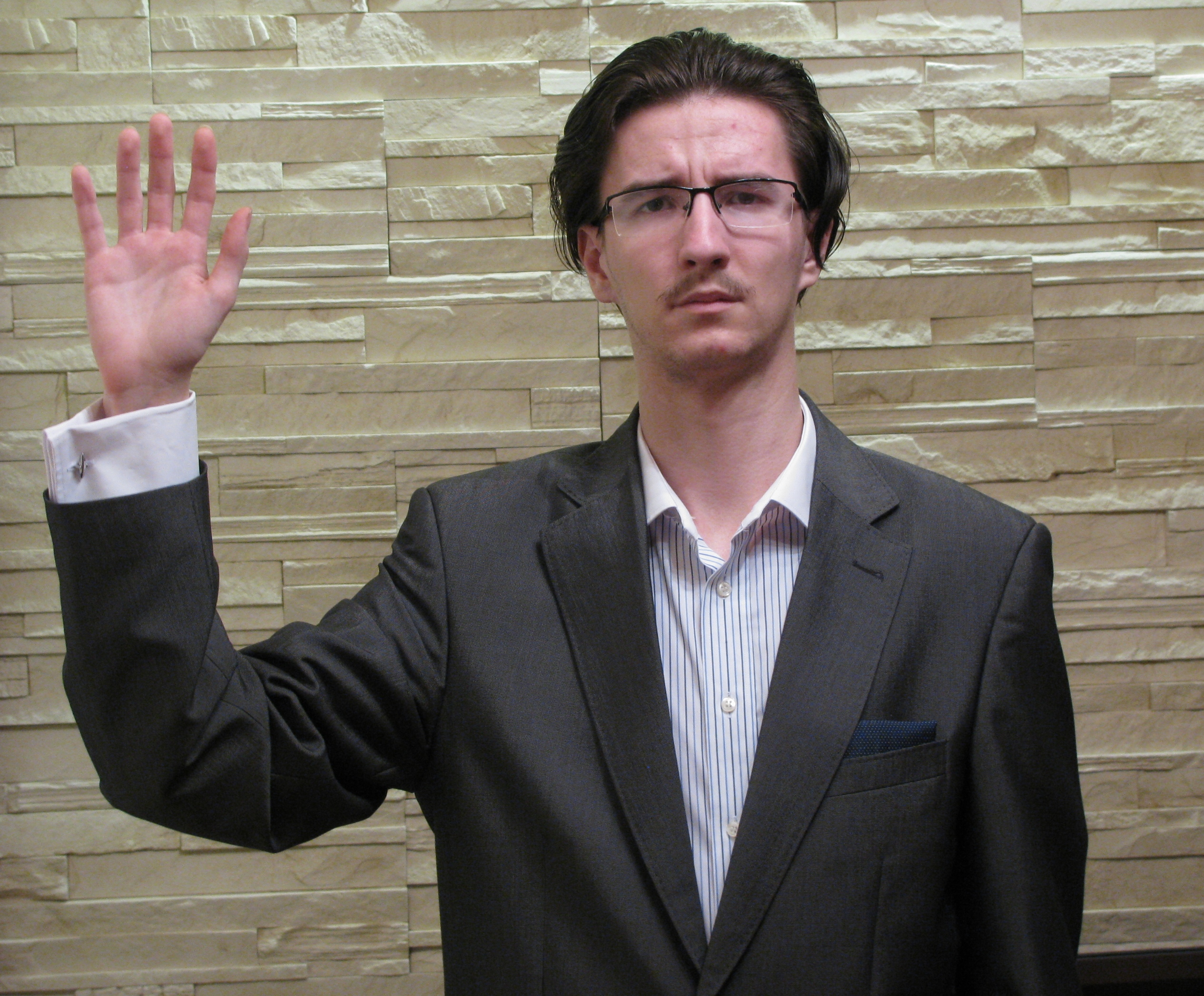 Błąd 5 sekund